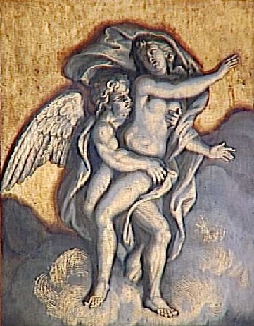 BOREE ENLEVANT ORYTHE ; Salon : Salon de Vénus, Grands appartements du Château de Versailles Emplacement : voussure ; nord-partie gauche